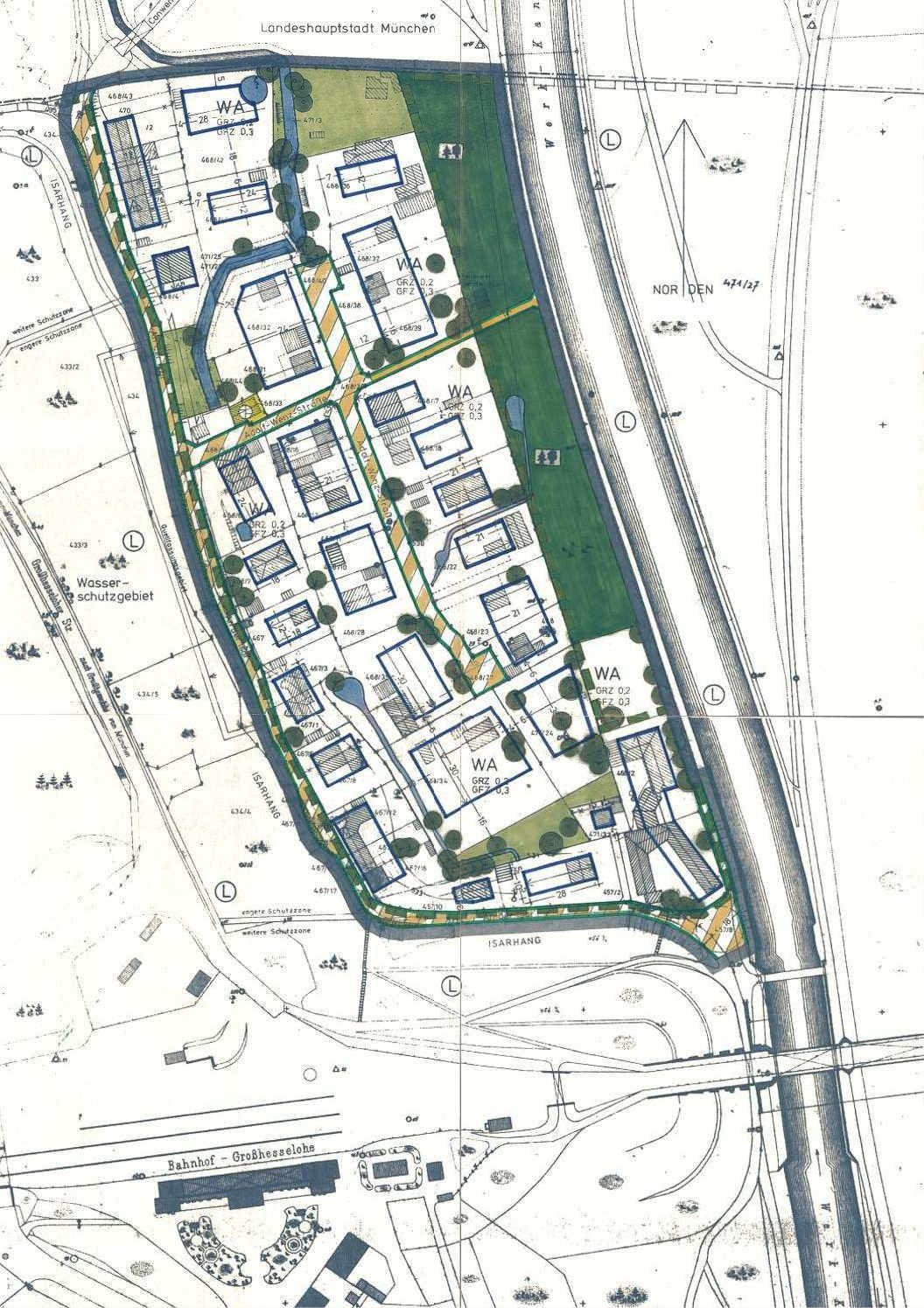 GEMEINDE PULLARCH IM ISARTAL Bebauungsplan Nr. 26 für das Gebiet ADOLF-WENZ-SIEDLUNG umfassend die Grundstücke zwischen Isarhang, der Gemeindegrenze gegen die Landeshauptstadt München und westlichem Damweg des Isar-Werkkanals